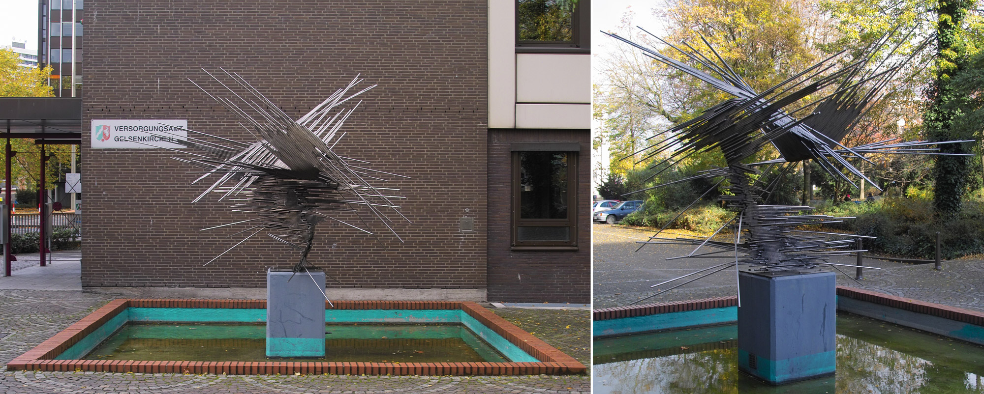 Stahlplastik by the german artist Norbert Kricke in Gelsenkirchen.